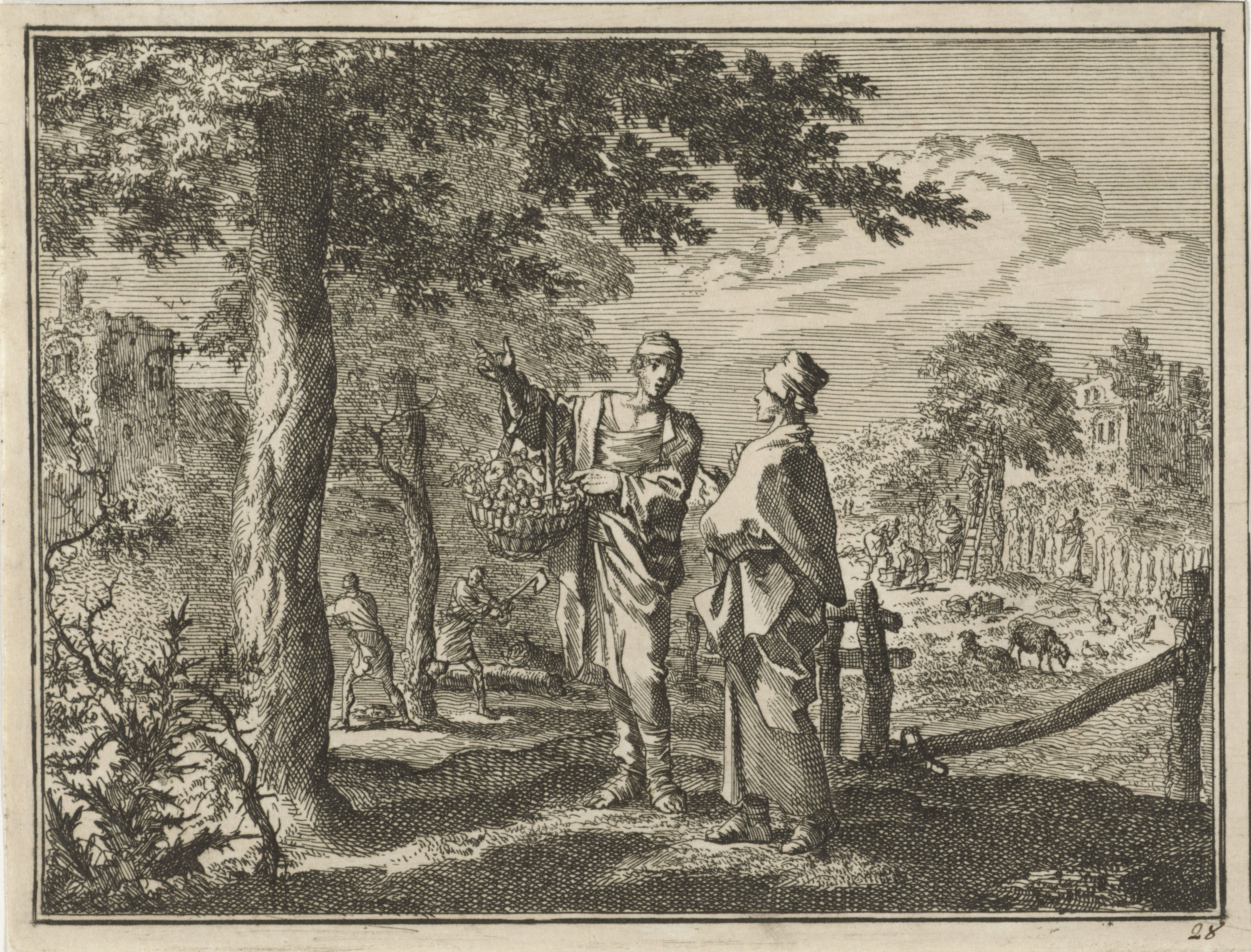 IdentificatieTitel(s): Mannen zoeken bij een boom naar vruchtenObjecttype: prent Objectnummer: RP-P-OB-45.973Catalogusreferentie: Van Eeghen 4268Opschriften / Merken: verzamelaarsmerk, verso, gestempeld: Lugt 2228nummer, recto, handschrift in bruine inkt: ‘28’VervaardigingVervaardiger: prentmaker: Jan LuykenPlaats vervaardiging: AmsterdamDatering: 1712Fysieke kenmerken: ets; proefdrukMateriaal: papier Techniek: etsenAfmetingen: blad: h 117 mm × b 153 mmToelichtingProefdruk van illustratie uit: Luyken, Jan. De schriftuurlyke geschiedenissen en gelykenissen van het Oude en Nieuwe Verbond, 2 delen. Amsterdam: Wed. Pieter Arentsz II en Cornelis van der Sys, 1712, dl. II.OnderwerpWat: good tree bears good fruit; corrupt tree bears evil fruit ~ proverbial saying of Christ (Matthew 7:17-18, 12:33; Luke 6:43)Verwerving en rechtenVerwerving: onbekendCopyright: Publiek domein